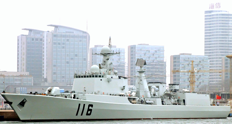 中文（中国大陆）: 停泊在码头的“石家庄”号导弹驱逐舰。